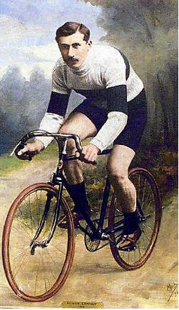 Hilaire Lannoy - wielrenner en ondernemer - Kortrijk - België